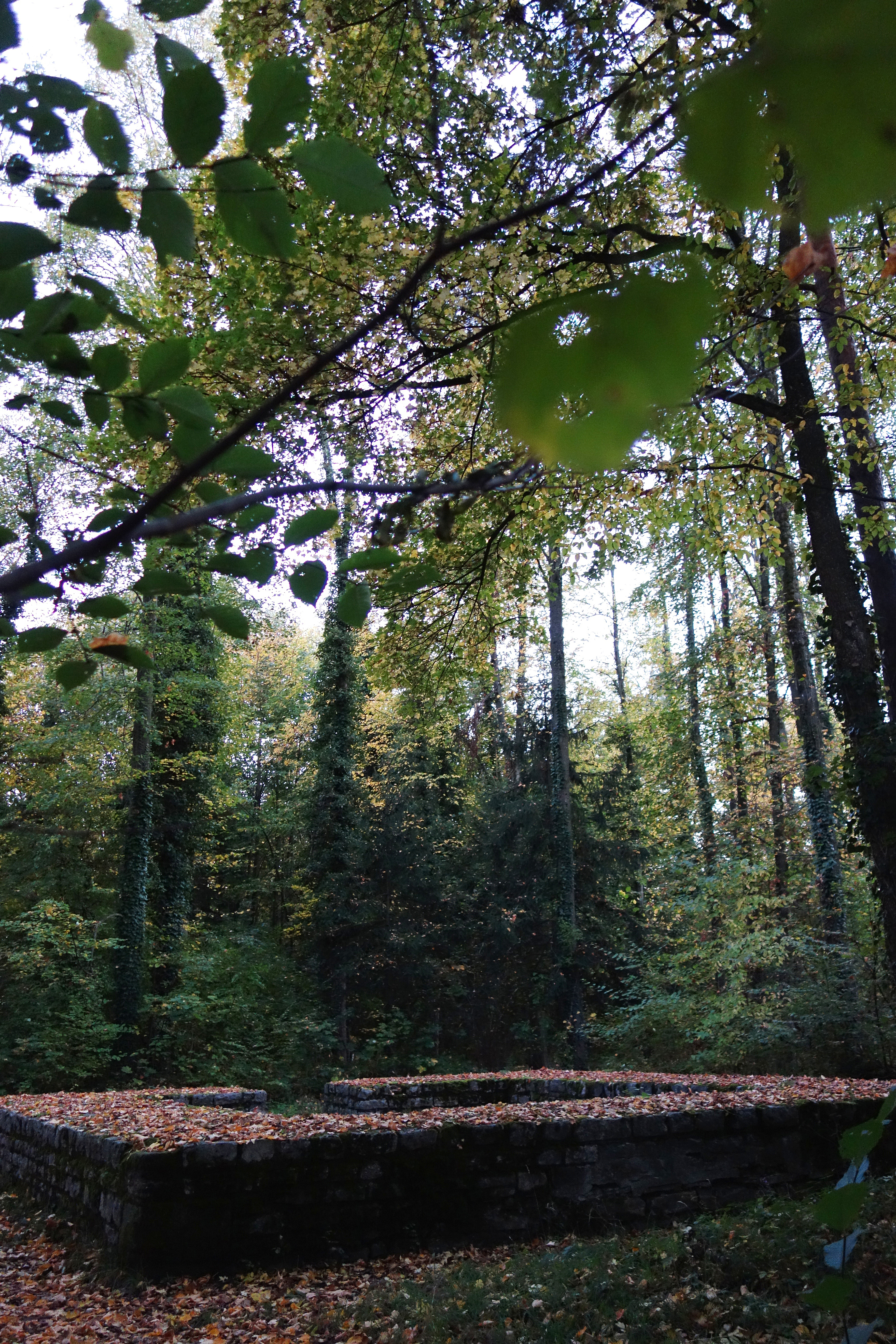 Römische Ruine, restauriert, im Au-Wald bei Muttenz.